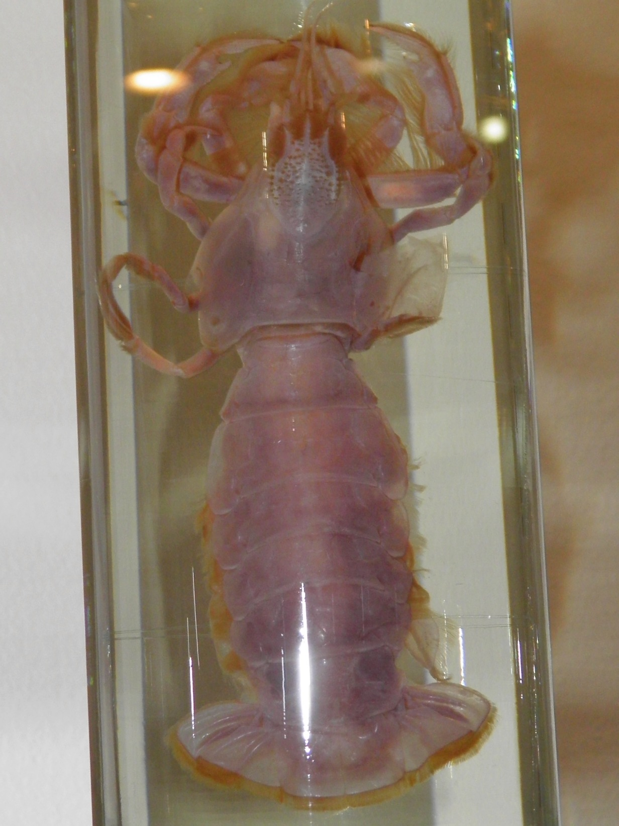 Upogebia issaeffi в Научном музее ДВФУ (г. Владивосток)